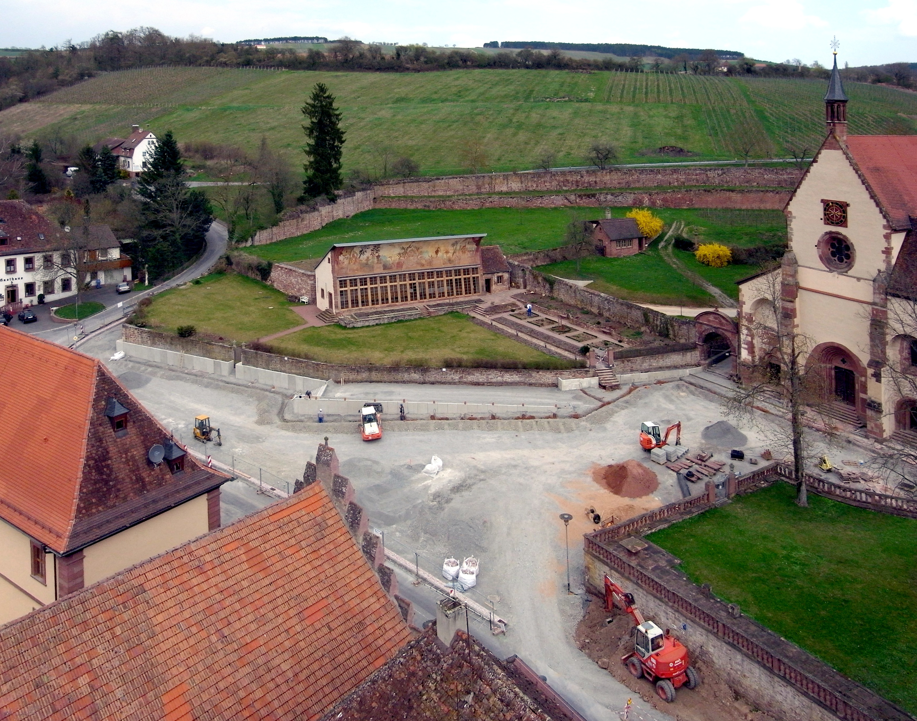 Vorplatz und Orangerie des Klosters Bronnbach während des Umbaus 2009